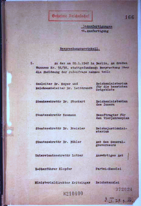 das Originaldokument (mit der Signatur Inland II g 177, Bl. 165ff) liegt im Politischen Archiv des deutschen Auswärtigen Amtes in Berlin. Dokumente aus der NS-Zeit sind so genannte "public domain", d.h. unterliegen keinem Copyright oder Nutzungsbestimmungen, sofern sie sich nicht in Privatbesitz befinden./Leiter der Verwaltung, Haus der Wannsee-Konferenz